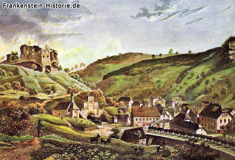 Kohlezugin Frankenstein im 19. Jahrhundert